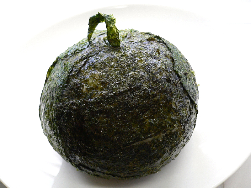 Bakudan (bomb) onigiri